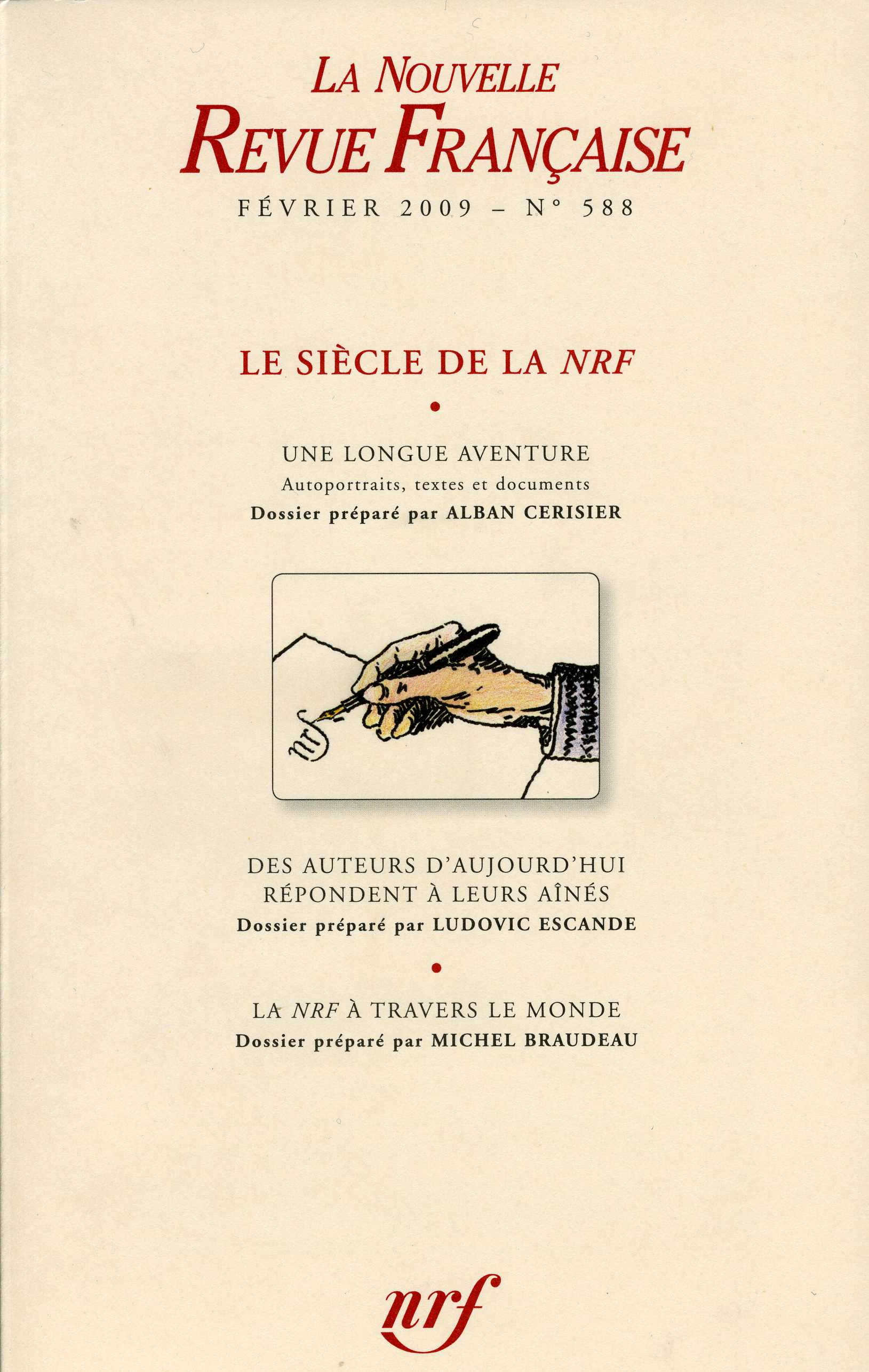 Portada de la NRF centenaria